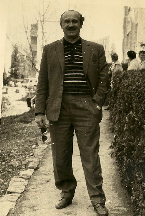 יעקב אורי, 1960